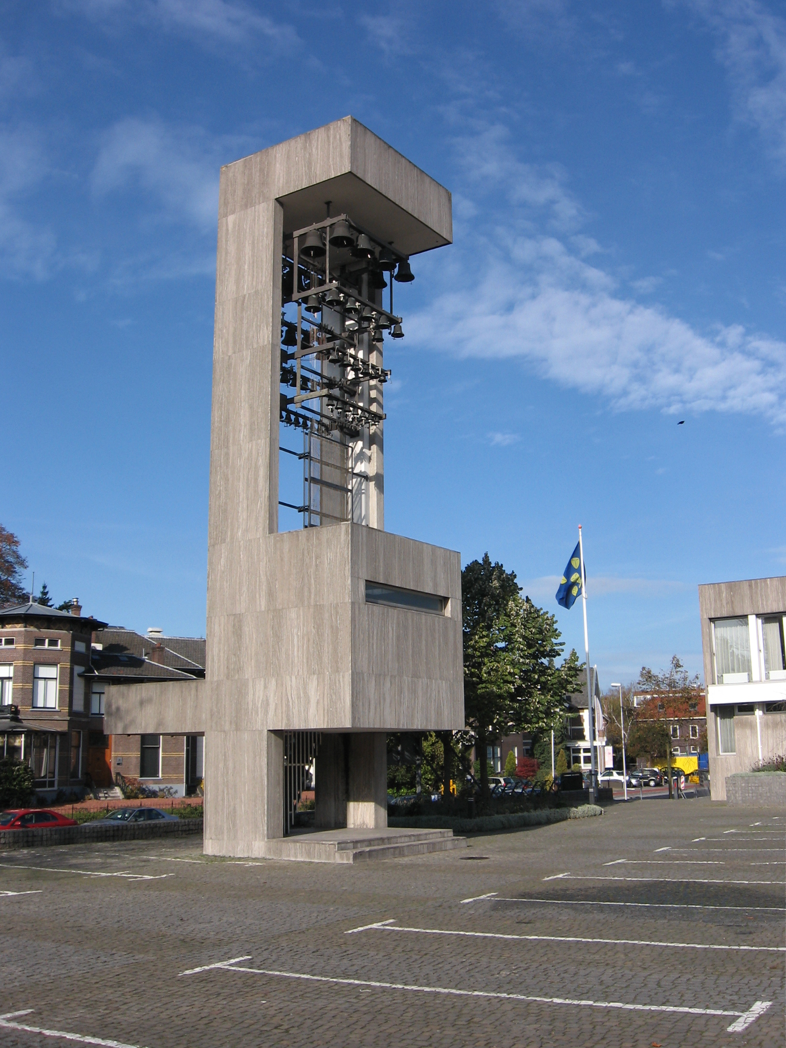 Gemeentehuis Bussum, Klokkentoren, 2008